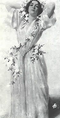 Vincent Vidal : Portrait d' Apollonie Sabatier (1822-1889) bohémienne, muze en gastvrouw